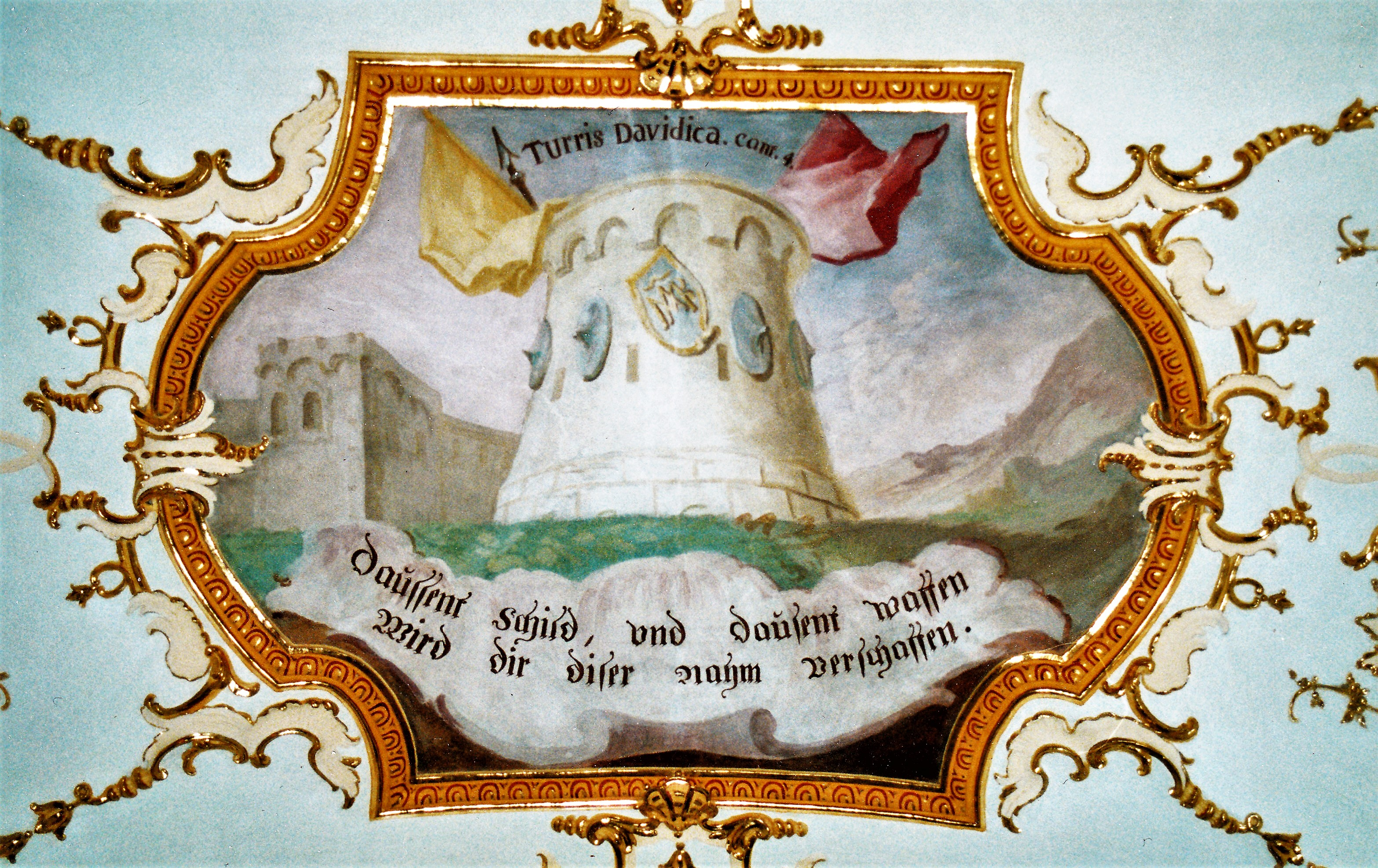 Maria Brünnlein - Fresko von Johann Baptist Zimmermann: Turris Davidica (Turm Davids)